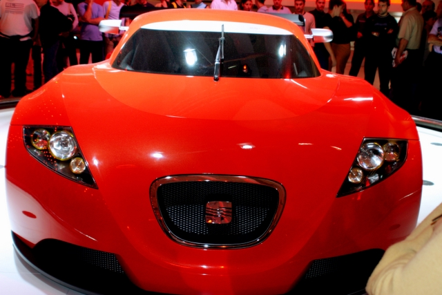 Car Expo-5